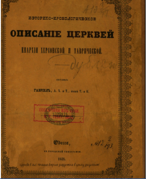 VSergo1